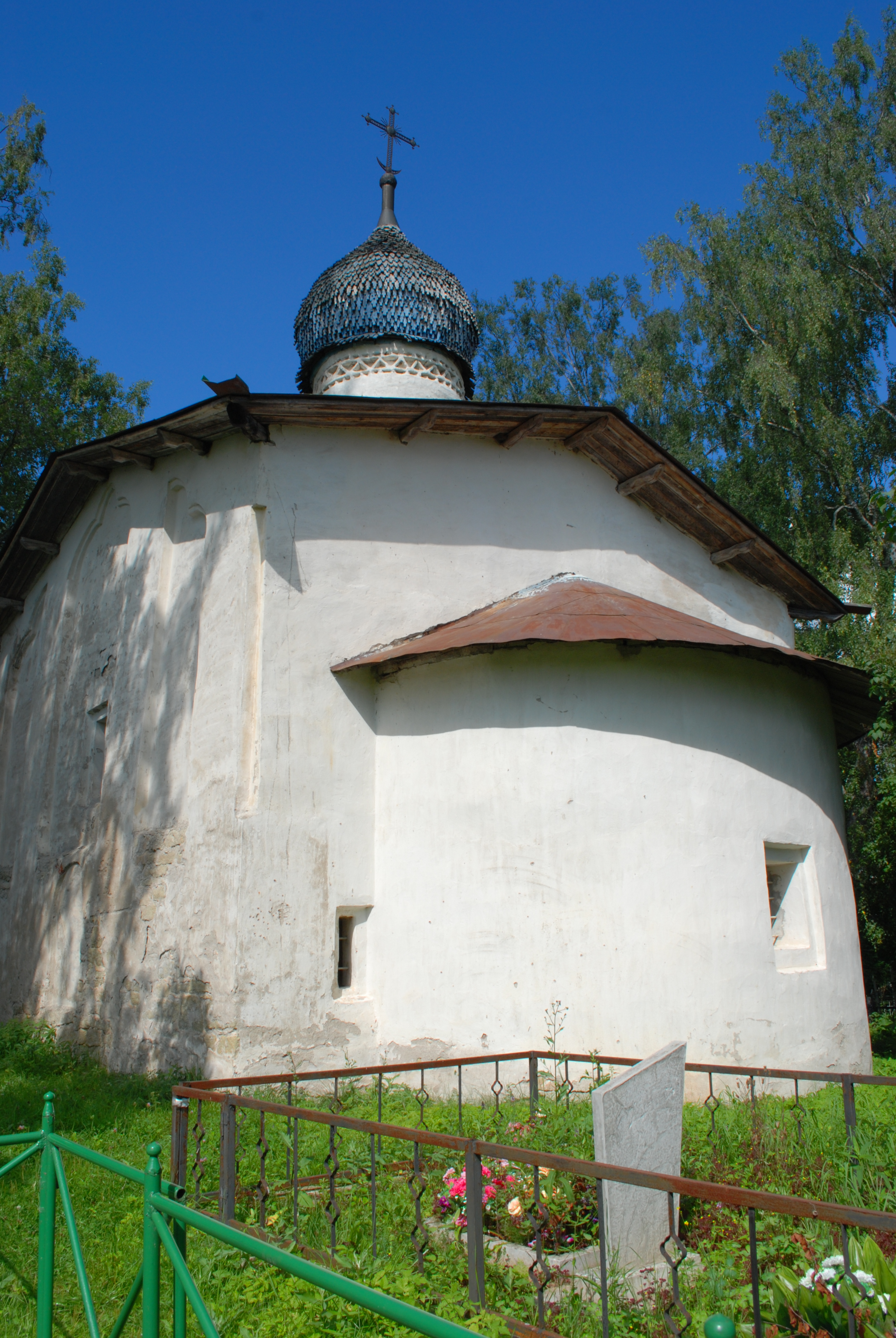 Церковь Пустое Воскресение (Псковская область, Пыталово, село Пустое Воскресение)